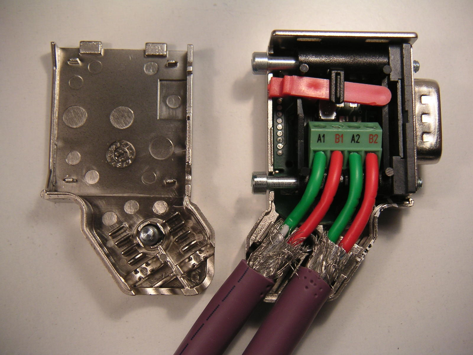 Geöffneter PROFIBUS-Stecker